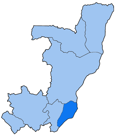 Mappa dell'arcidiocesi cattolica di Brazzaville, nella Repubblica del Congo.